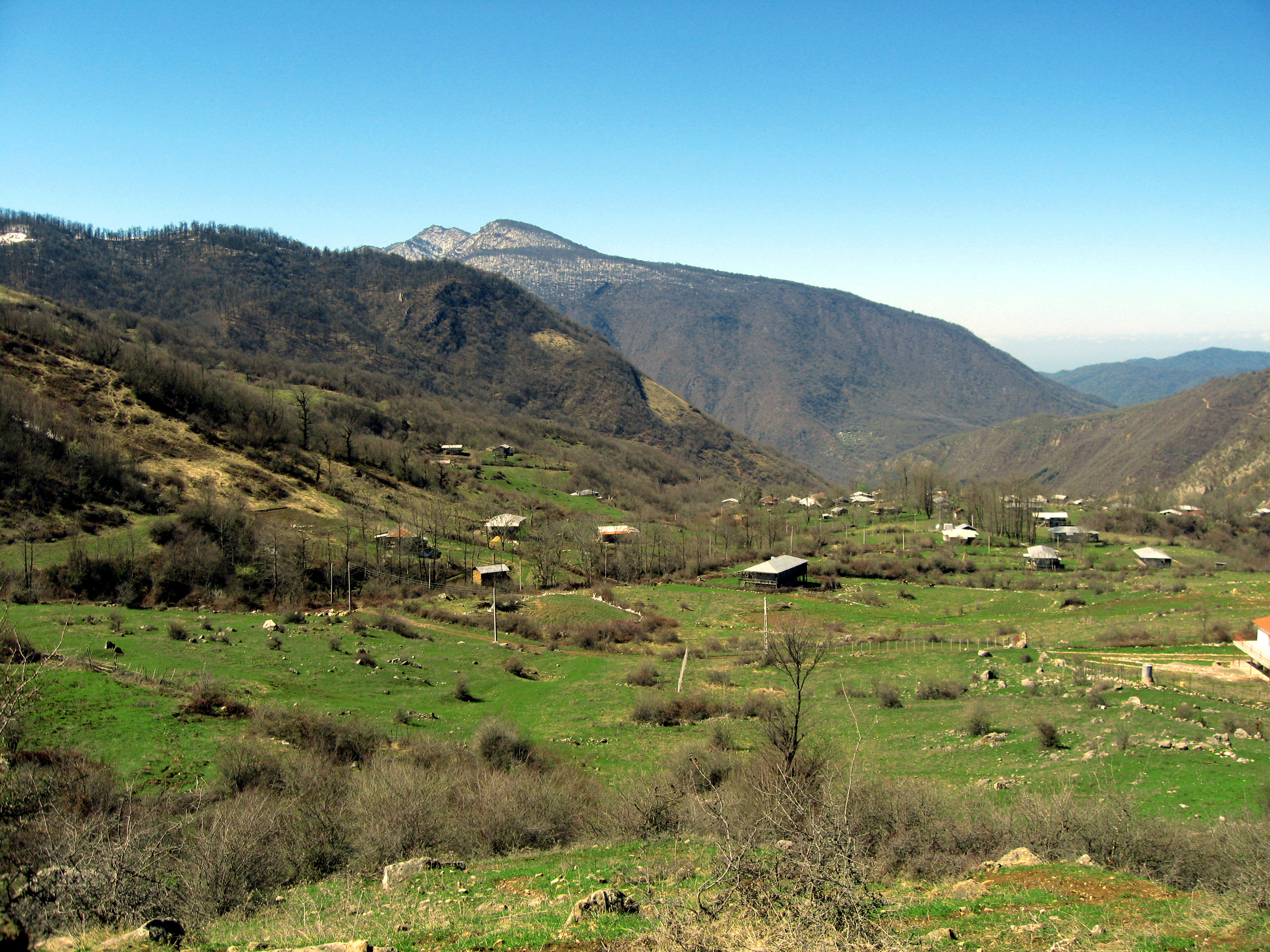 Golestan - Aliabad Katool - Balacheli